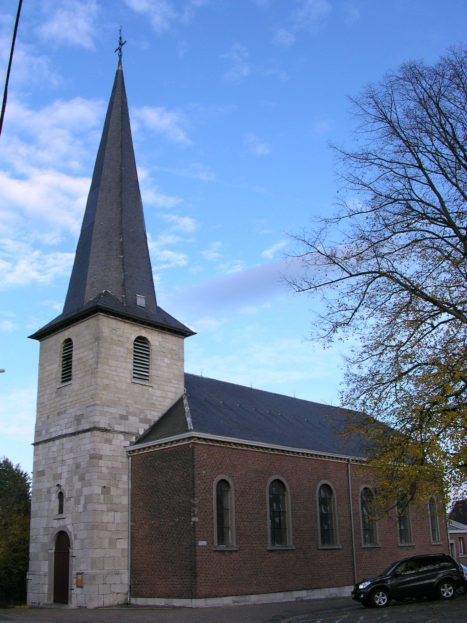 Fléron, L'église St Denis au cœur de l'ancien village de Fléron. Kirche St. Denis